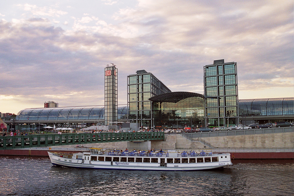 Berlin, Hauptbahnhof